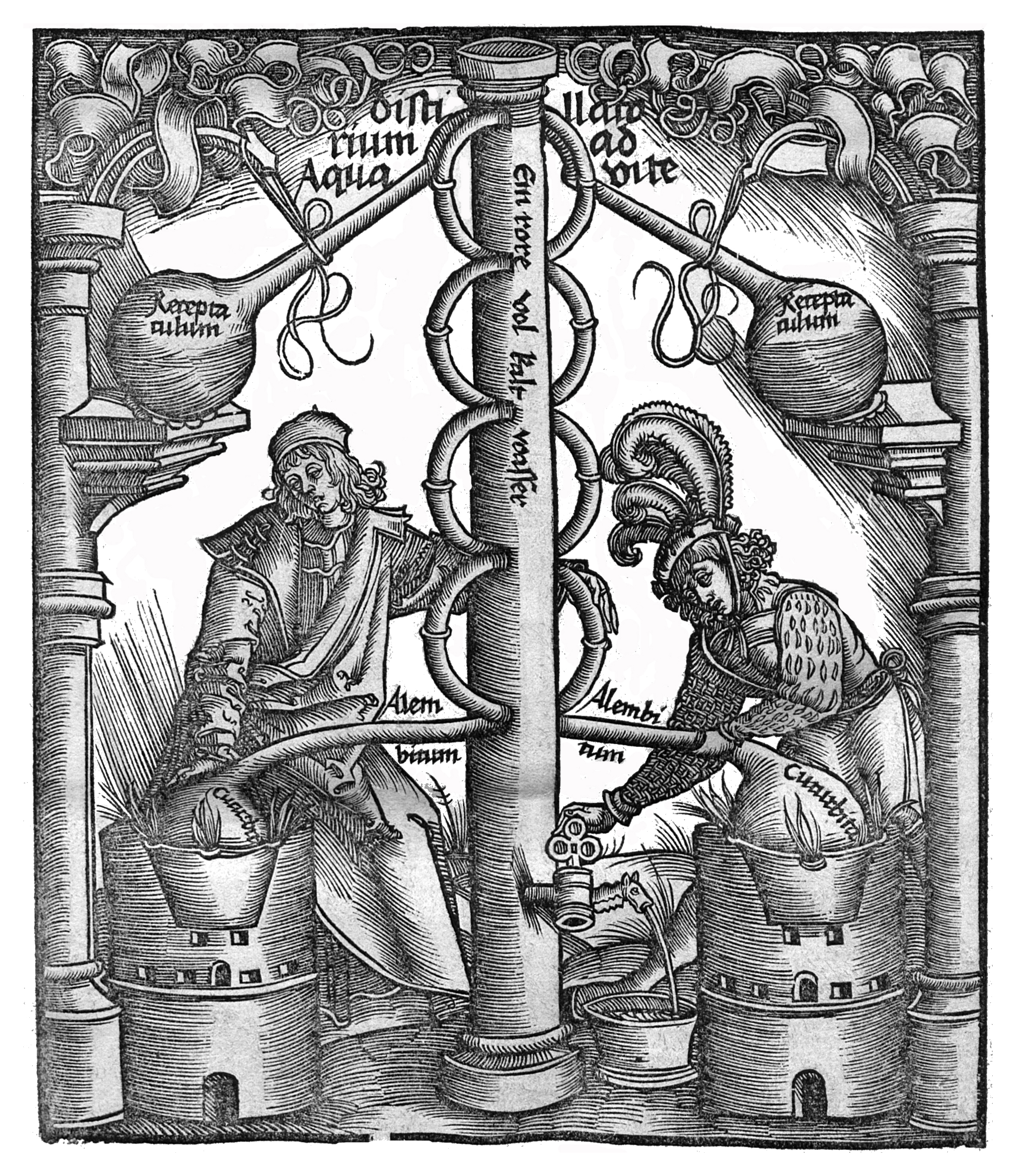 Titelblatt mit der Abbildung eines Ofens zur fraktionierenden Destillation